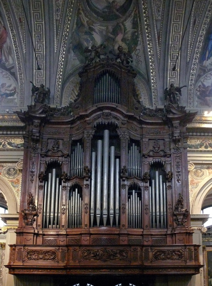 Organo della ditta Balbiani Vegezzi-Bossi presso il Santuario di Santa Maria della Fonte di Caravaggio (Bergamo).jpg